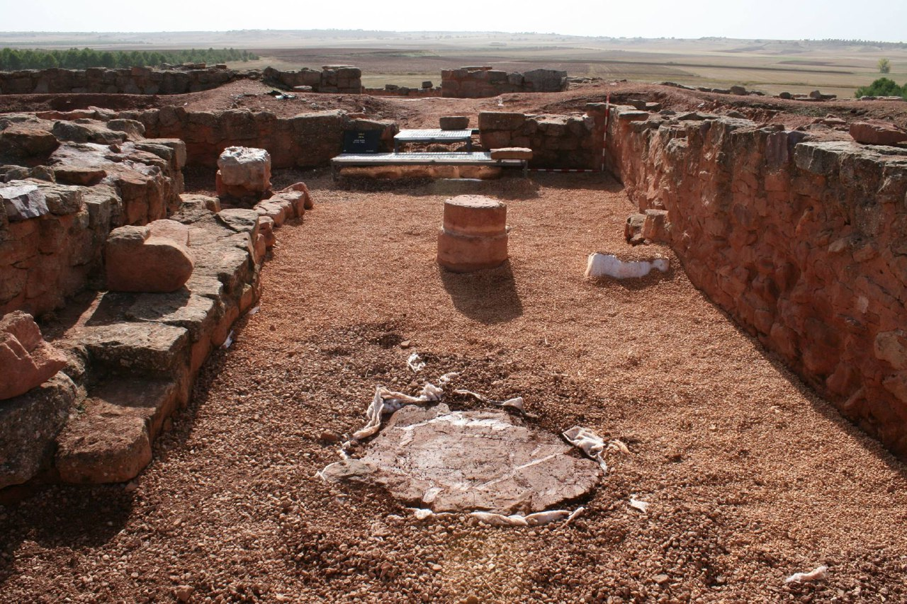 Cortijada segunda fase de Jamila.